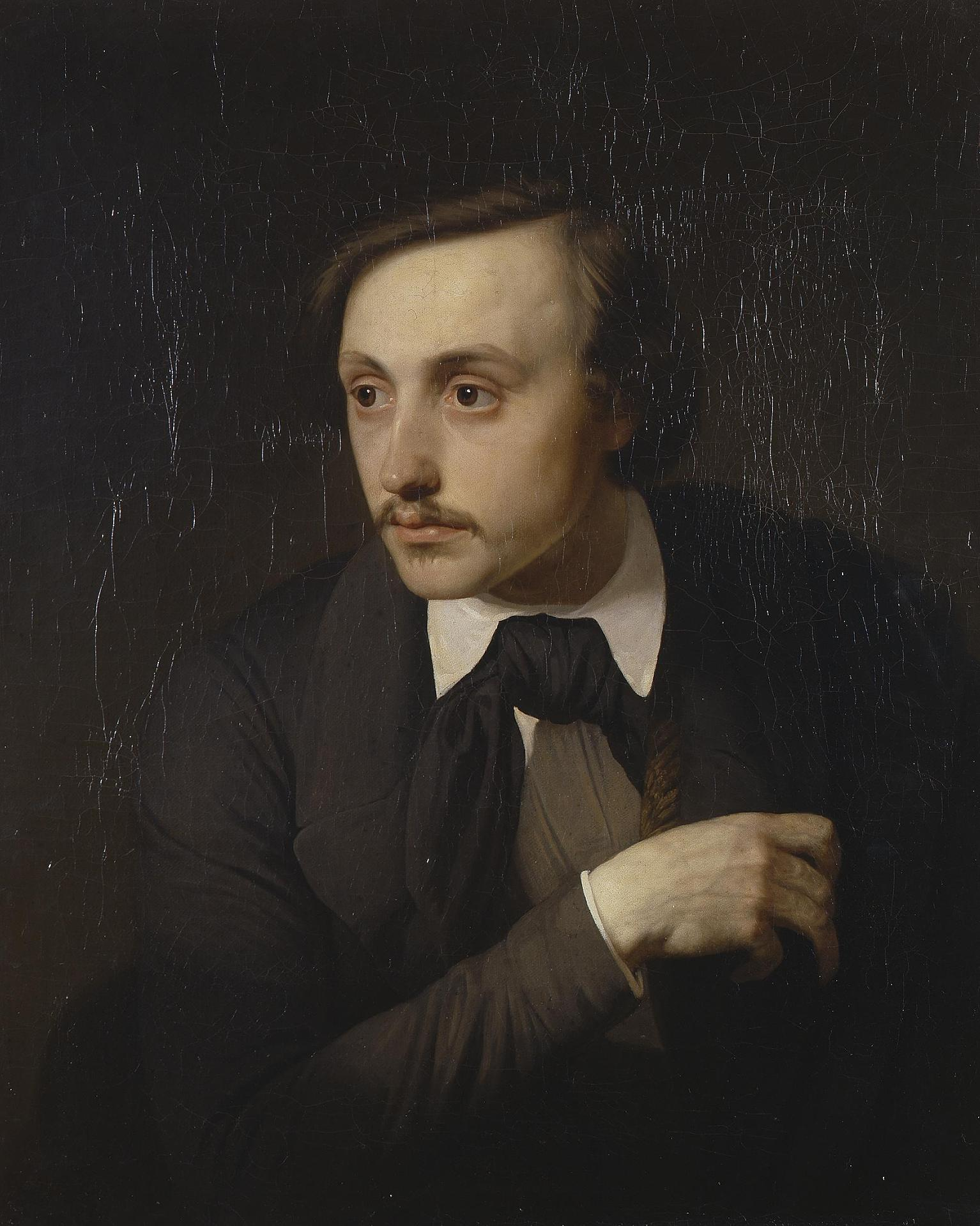 Портрет художника Ивана Ивановича Соколова